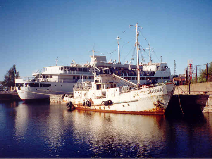 Junga